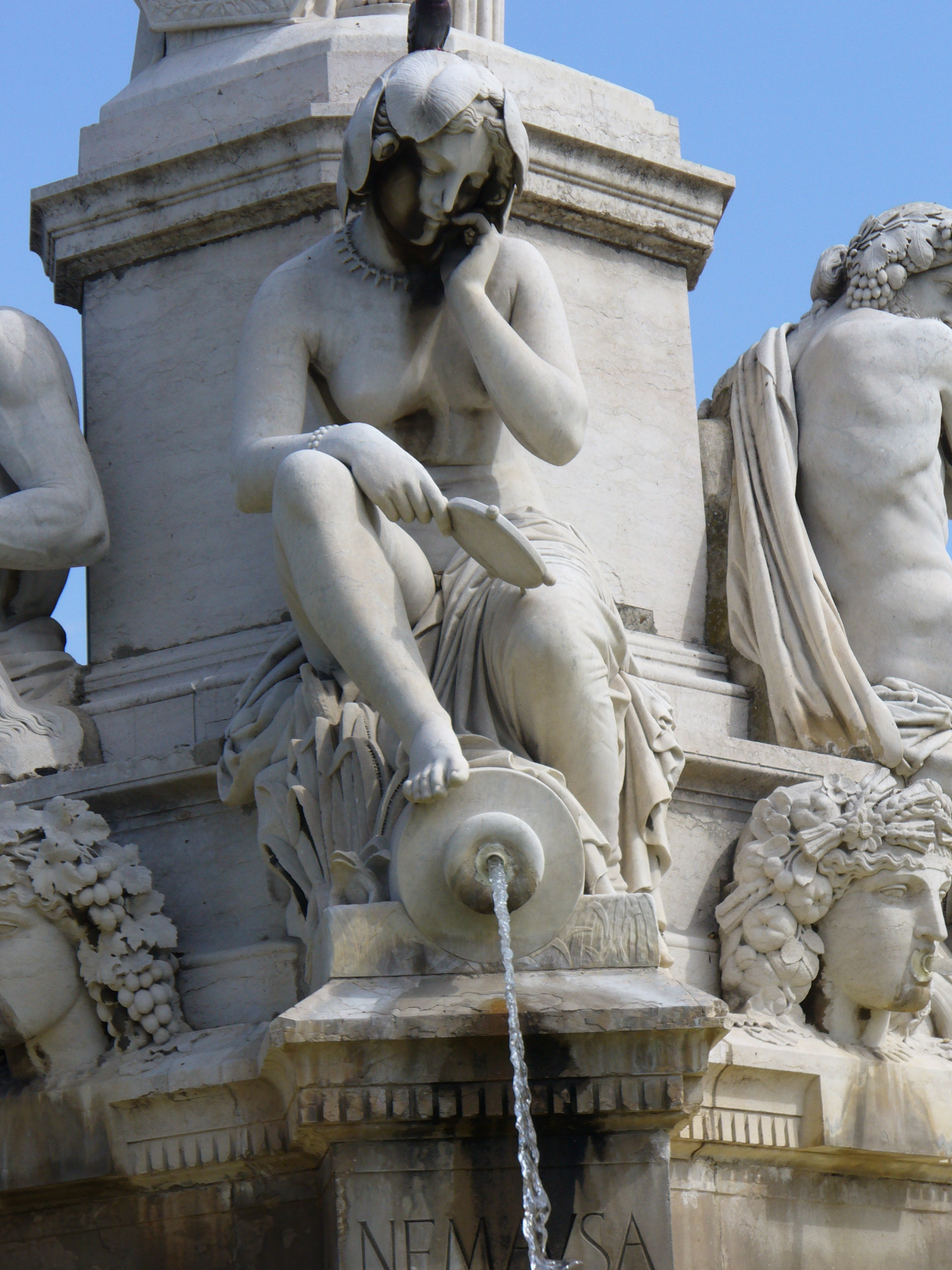 Nimes-Fontaine de Pradier-Pradierbrunnen